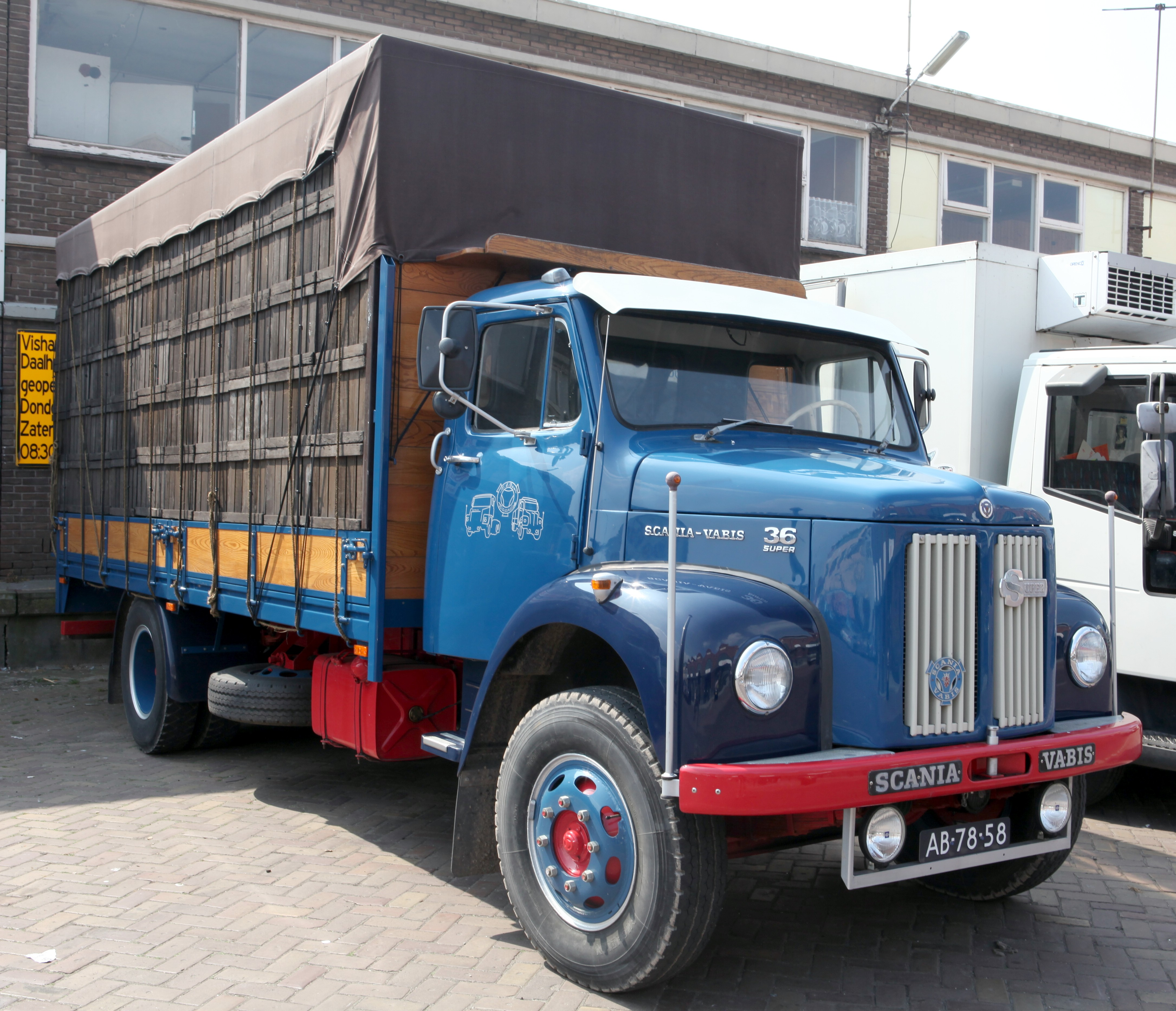 Scania Vabis 36 Super